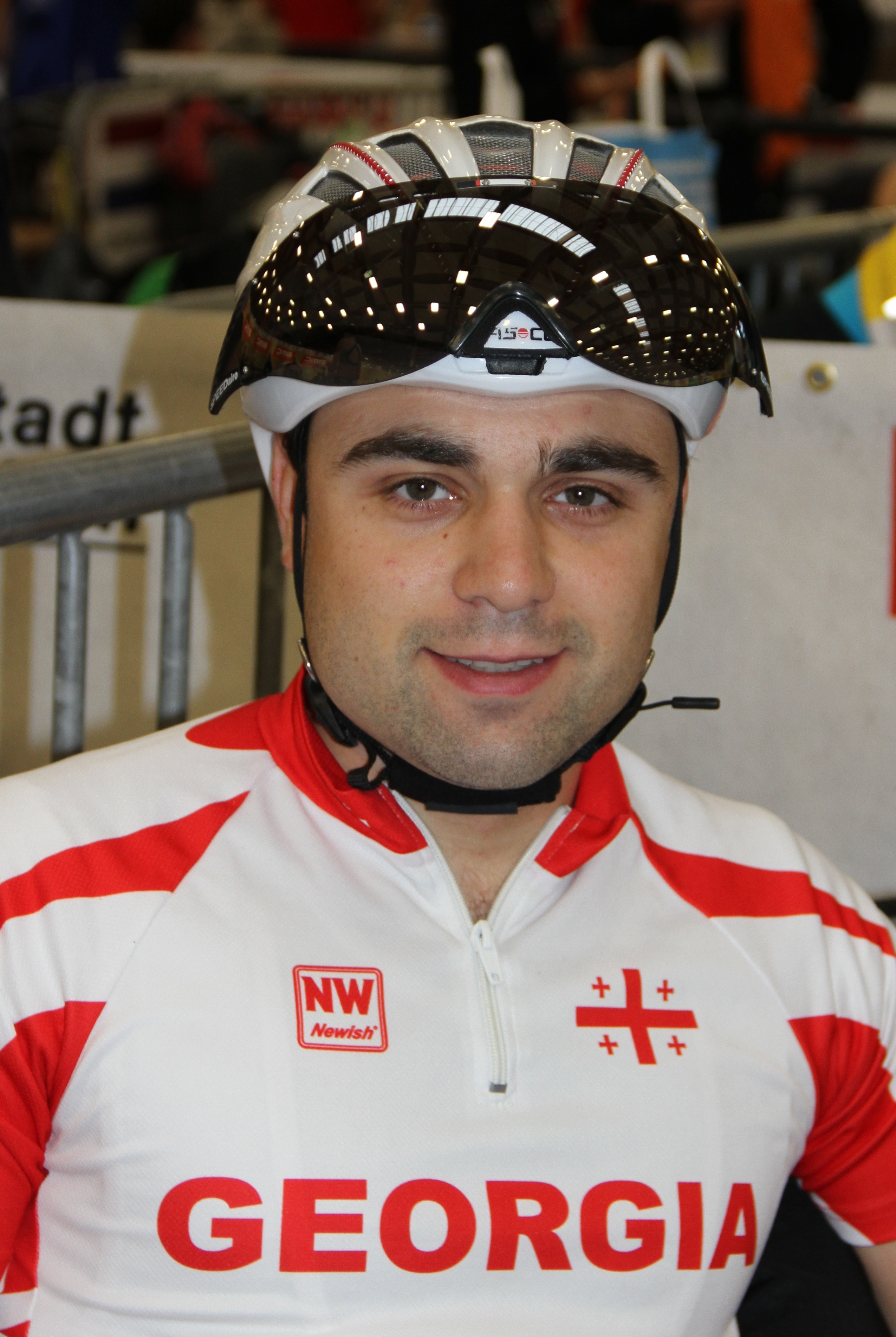 Davit Askurava, georgischer Radsportler The making of this document was supported by the Community-Budget of Wikimedia Germany.